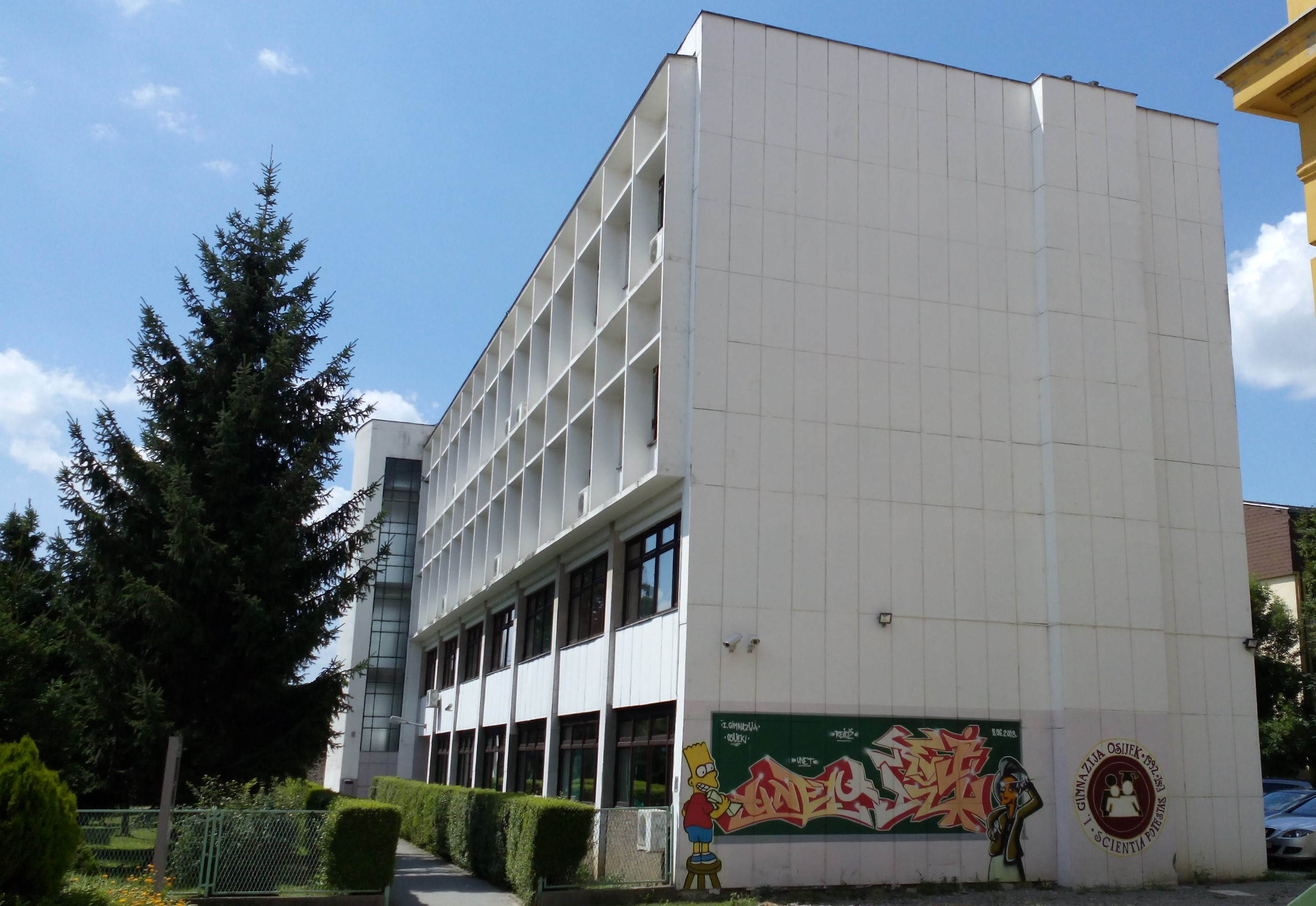 I. gimnazija Osijek.